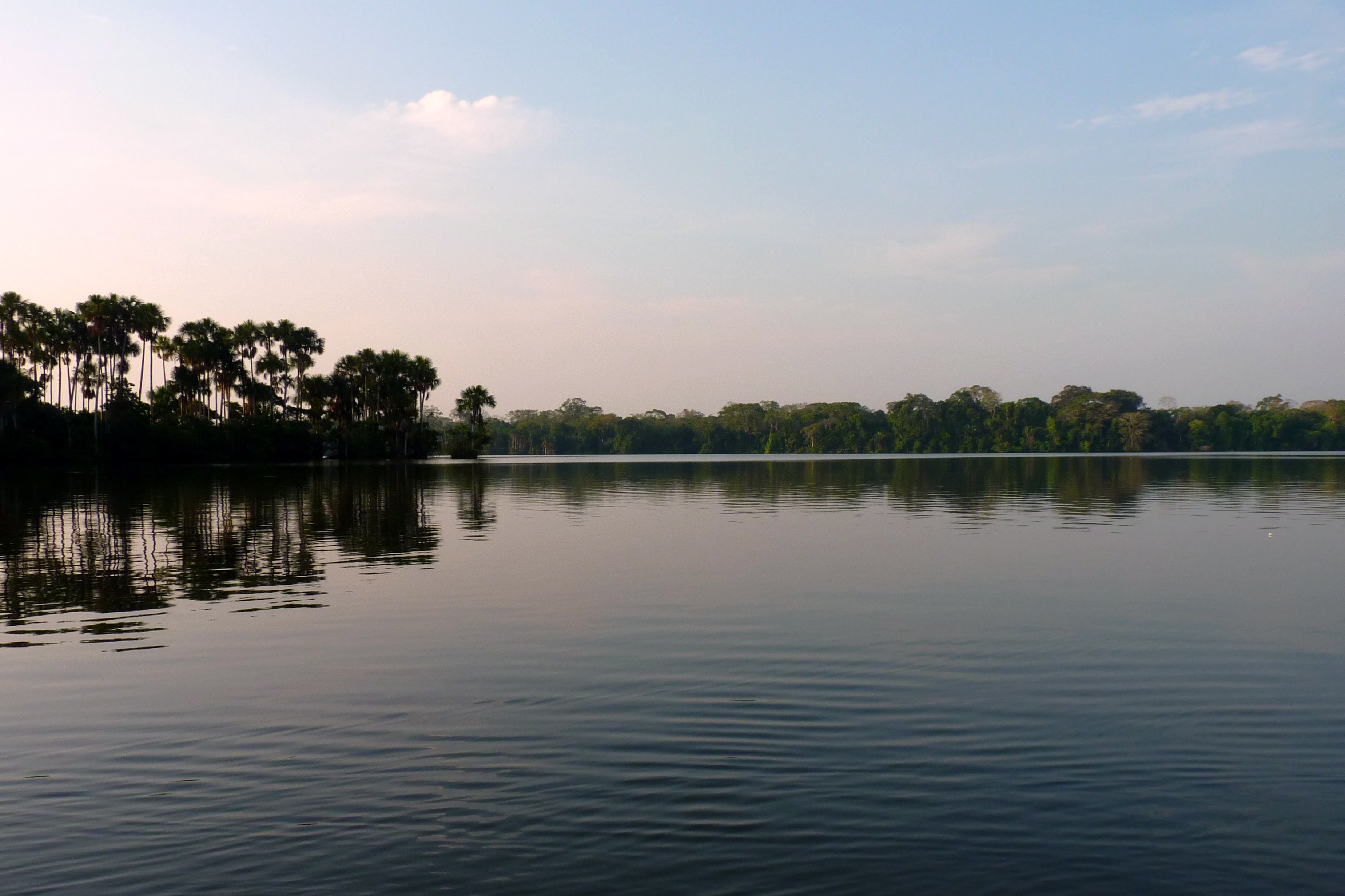 Peru.